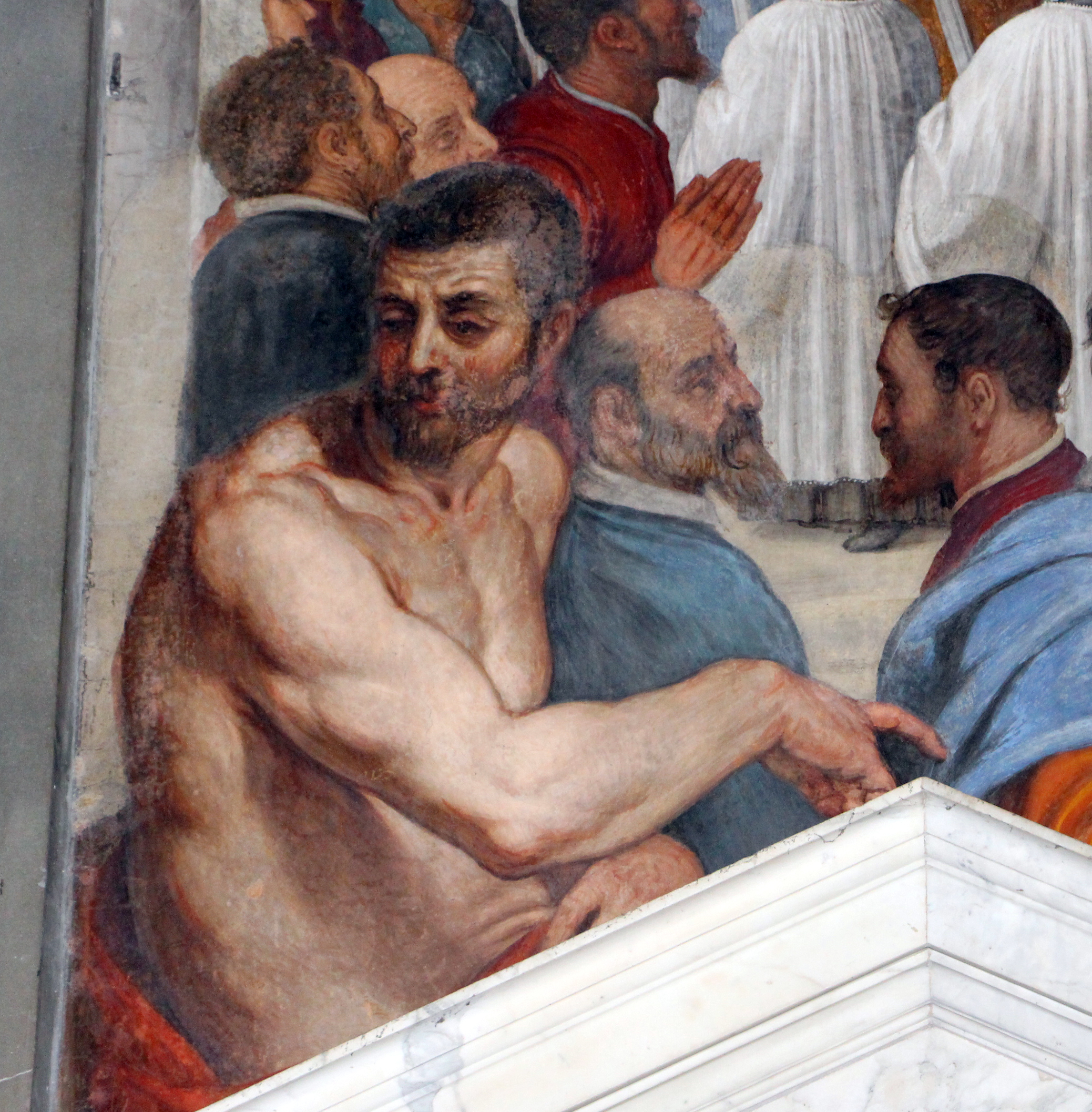 San Marco, Firenze